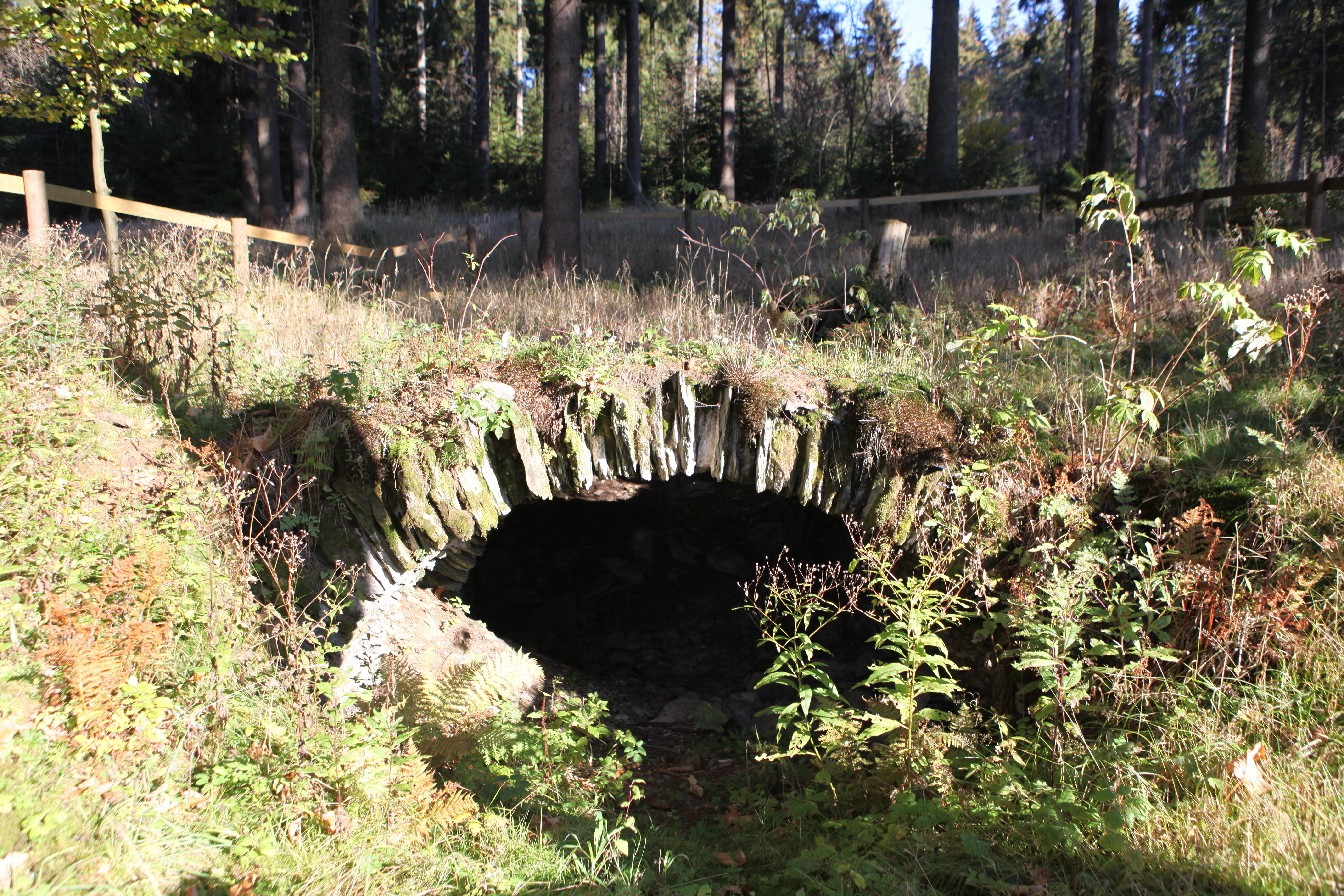 Wüstung Glücksthal, Gewölbe, Neuhaus am Rennweg